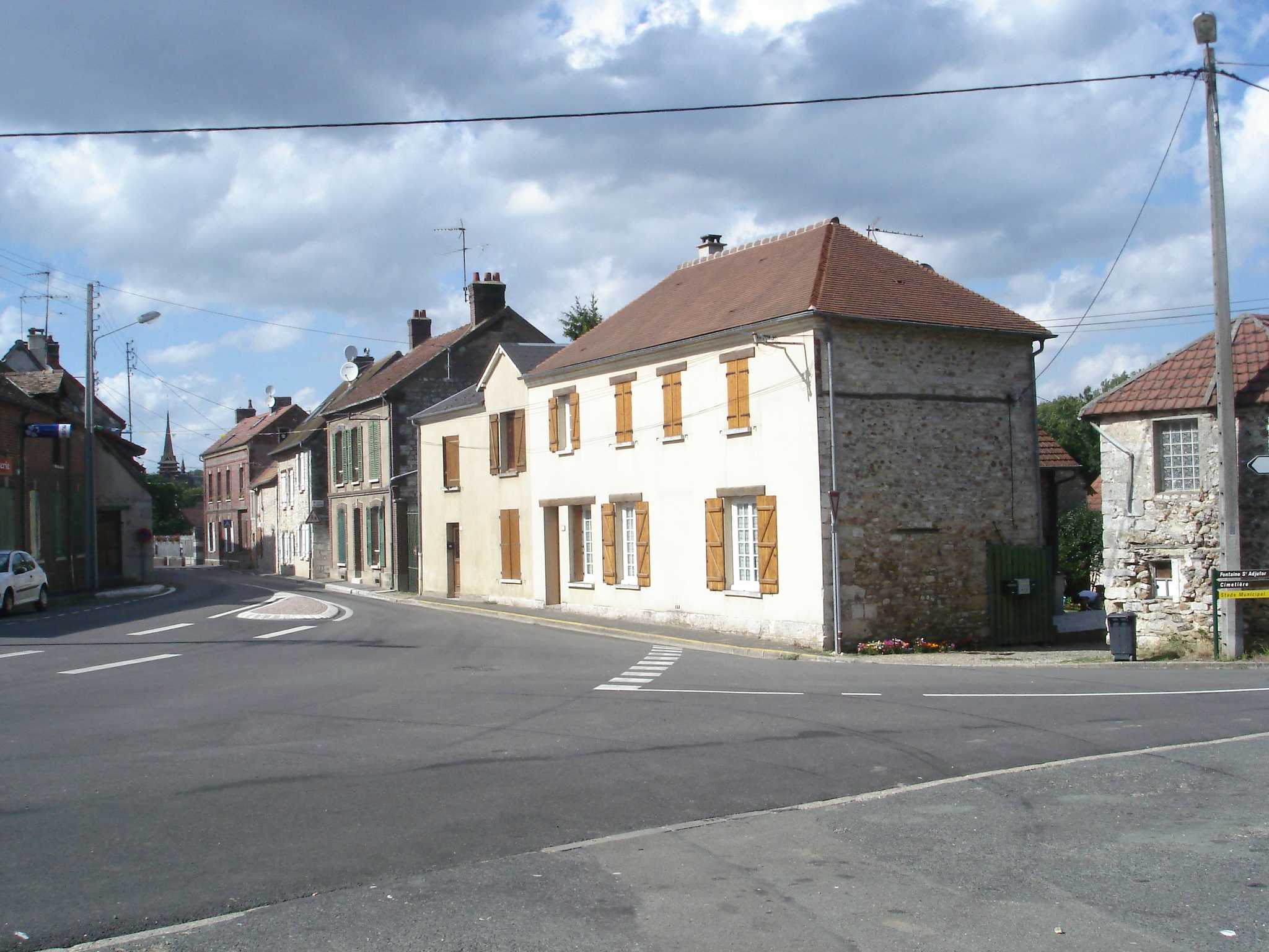 Ville de Blaru se trouvant dans les Yvelines (France) - 2006. Auteur : Jean-Claude Perez